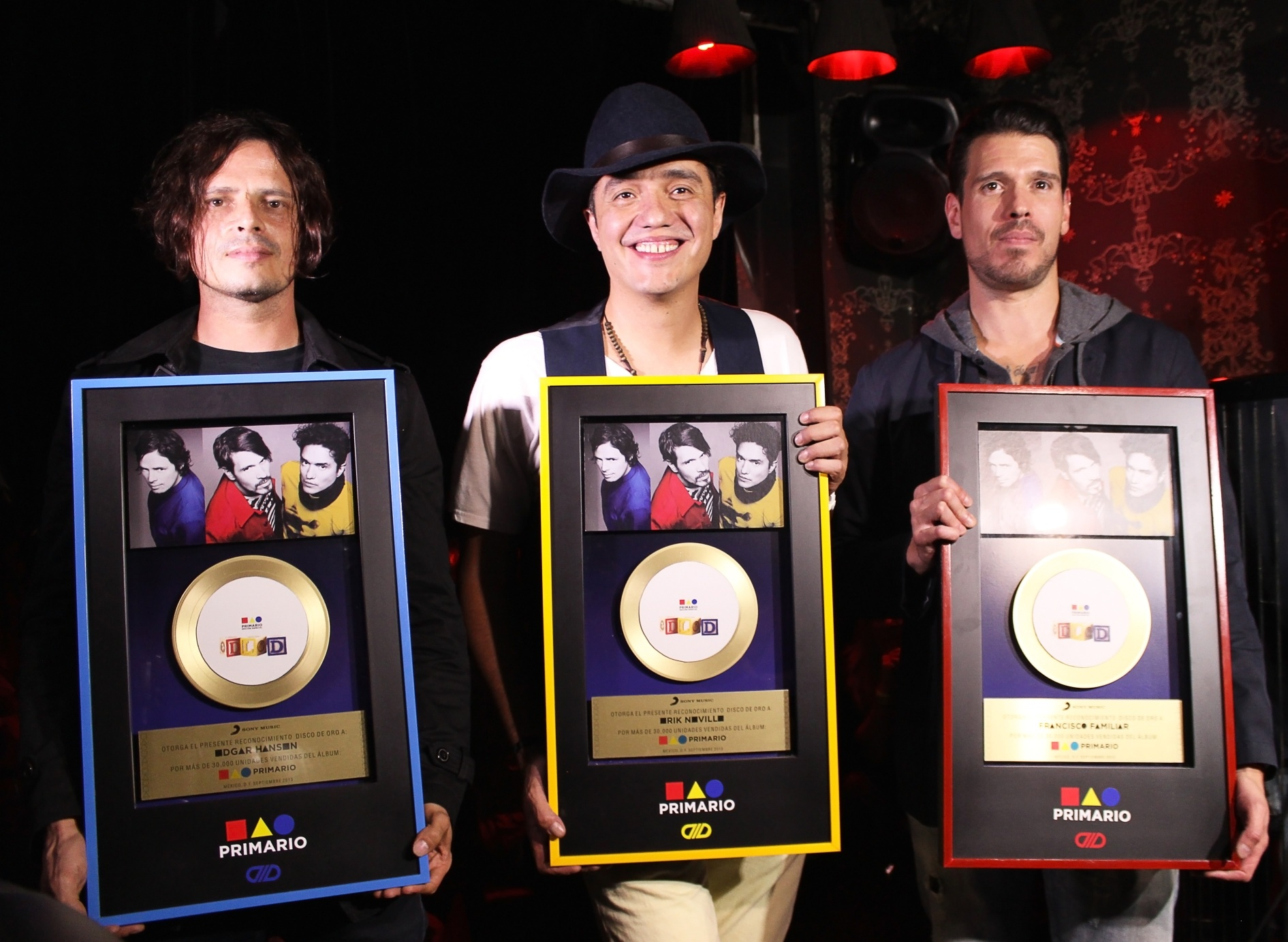 DLD recibe disco de oro por "Primario"